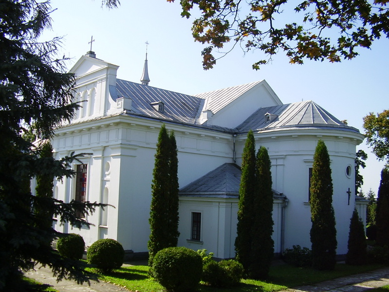 Індура. Касцёл Найсвяцейшай Тройцы